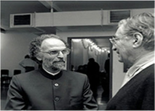 Lassâd Saïdi et Jaques Lecoq à la soirée de l'école Lecoq - Juin 1995